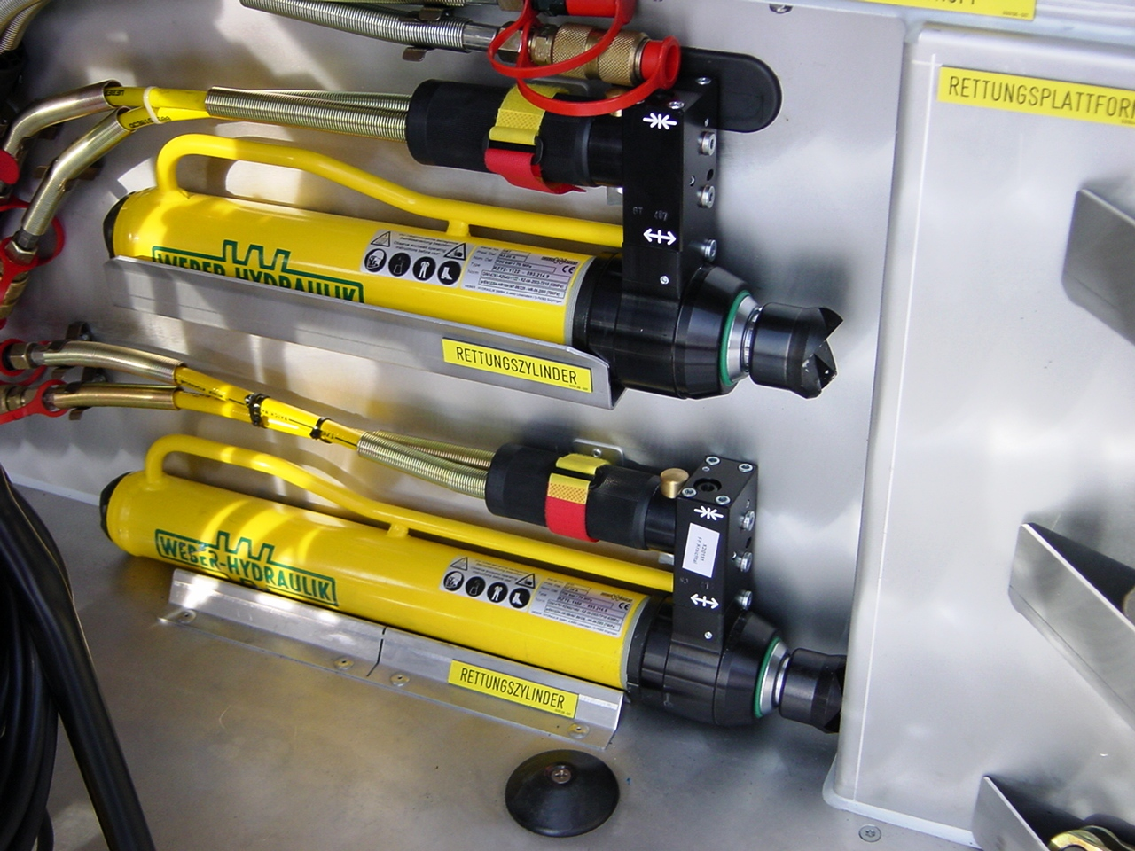 Rettungszylinder, HLF der Abteilung Menzingen, Feuerwehr Stadt Kraichtal